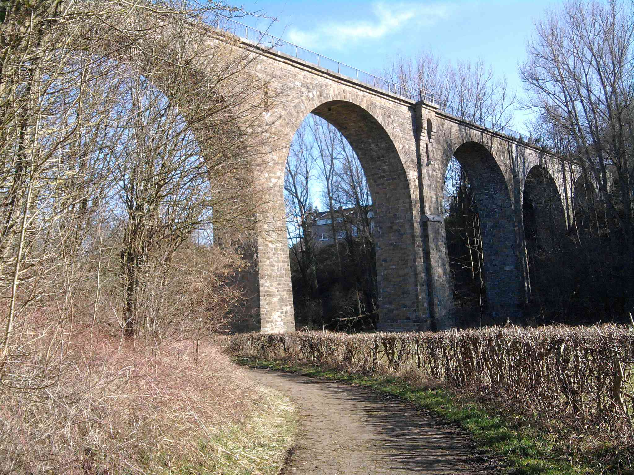 Brücke über den Iterbach bei Kornelimünster